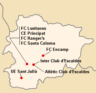 Répartition des clubs de Primera Division 2006-2007.